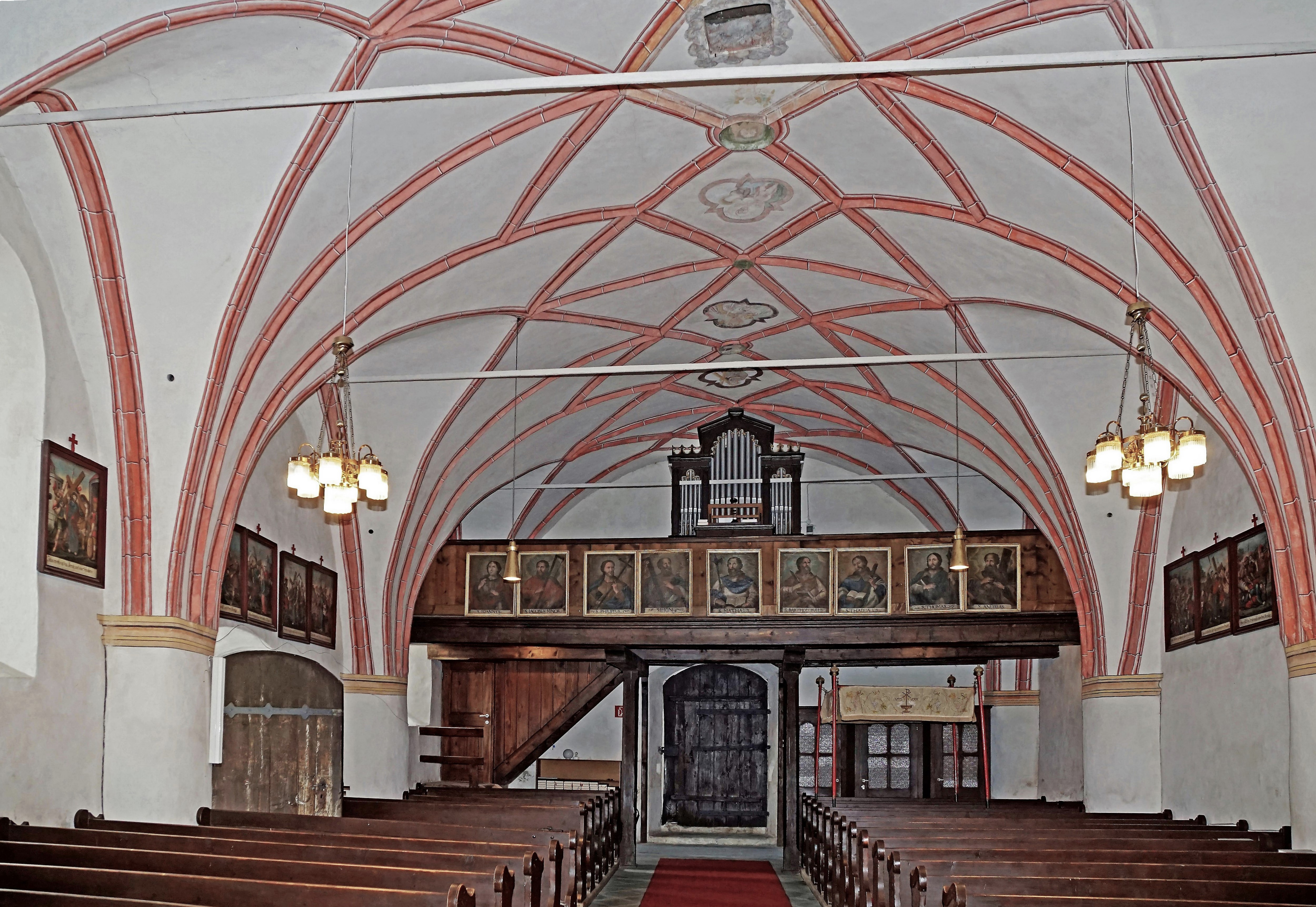 Kath. Pfarrkirche Hl. Margareta (Glödnitz), Innenansicht zur Orgelempore